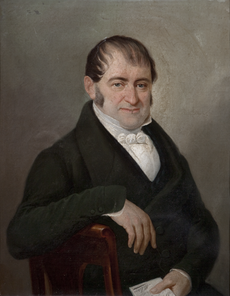 Ritratto di Antonio Caimi (1811-1878) con cartiglio